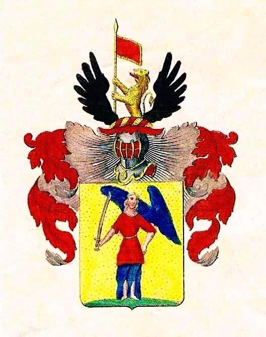 Familienwappen derer von Engel, wie im schwedischen Diplom von 1662 verliehen.